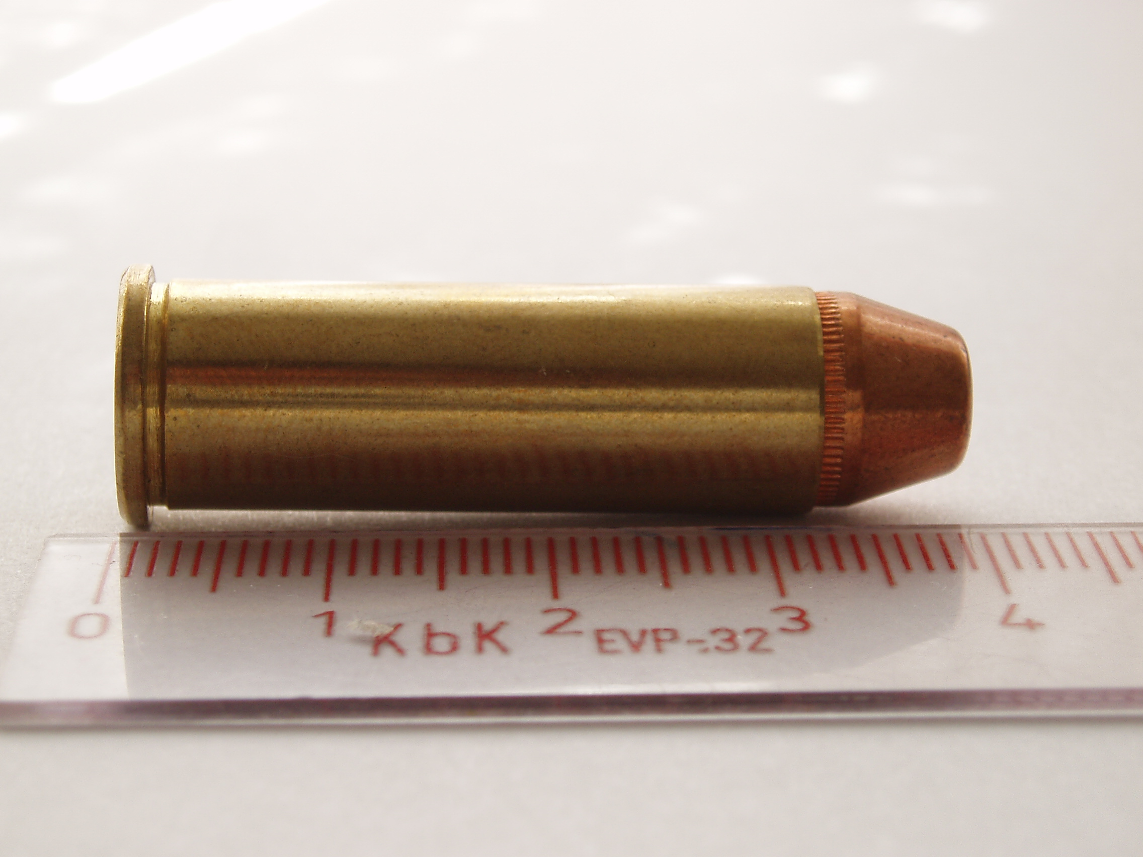 41 Remington Magnum. SP bullet.